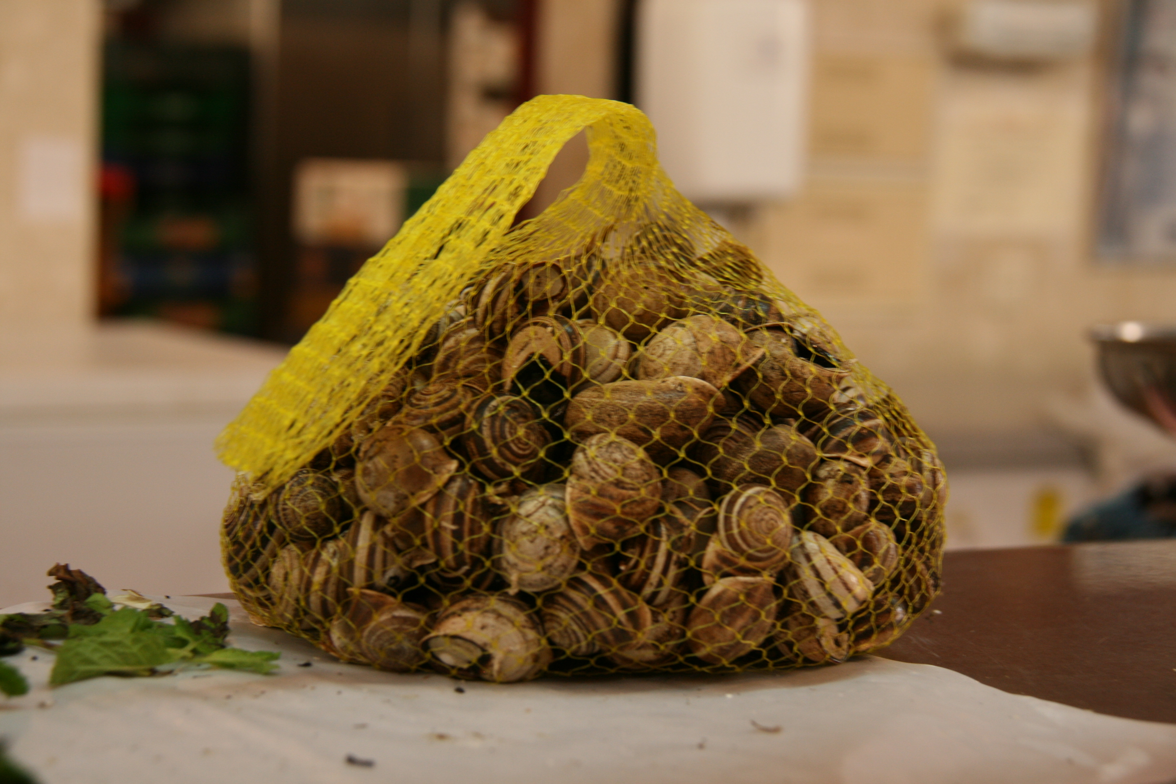 xonetas - Caracol serrano